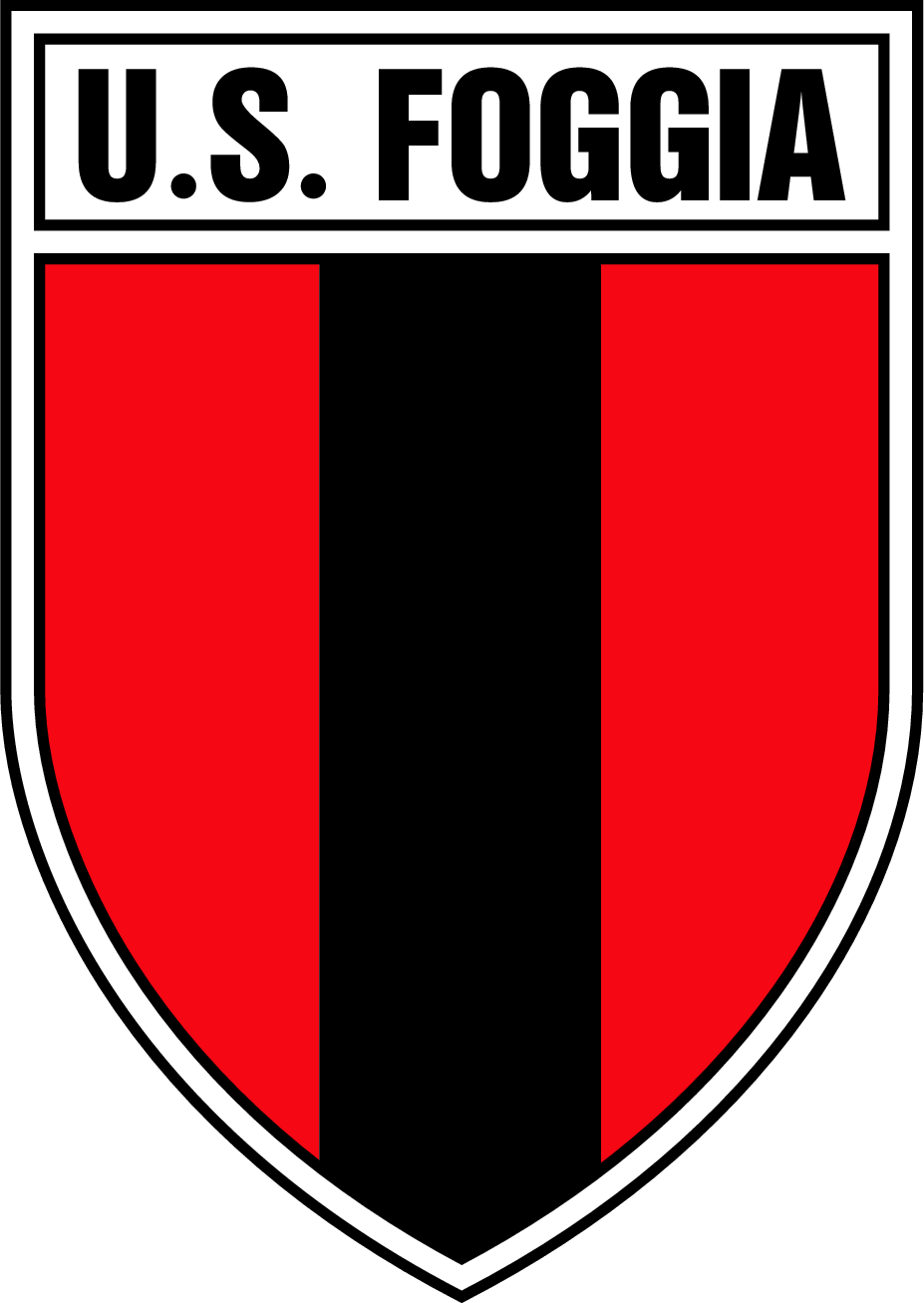 Logo del Foggia utilizzato tra gli anni 70 e 80